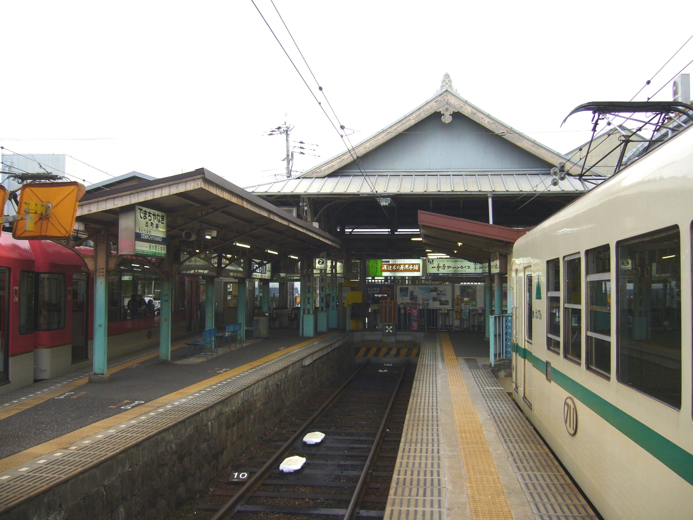 叡山電鉄叡山本線出町柳駅のホームをホームの北端から撮影。右の1番線にはデオ700系の八瀬比叡山口駅行が、左の3番線には900系（きらら）の鞍馬駅行が停車中。後方には表からは新駅舎に隠されて見えない、伝統ある木造の旧駅舎が見える。2007年10月13日に投稿者が撮影。